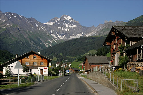 Restaurant Sternen in Elm (bei der Talstation der Bergbahnen)